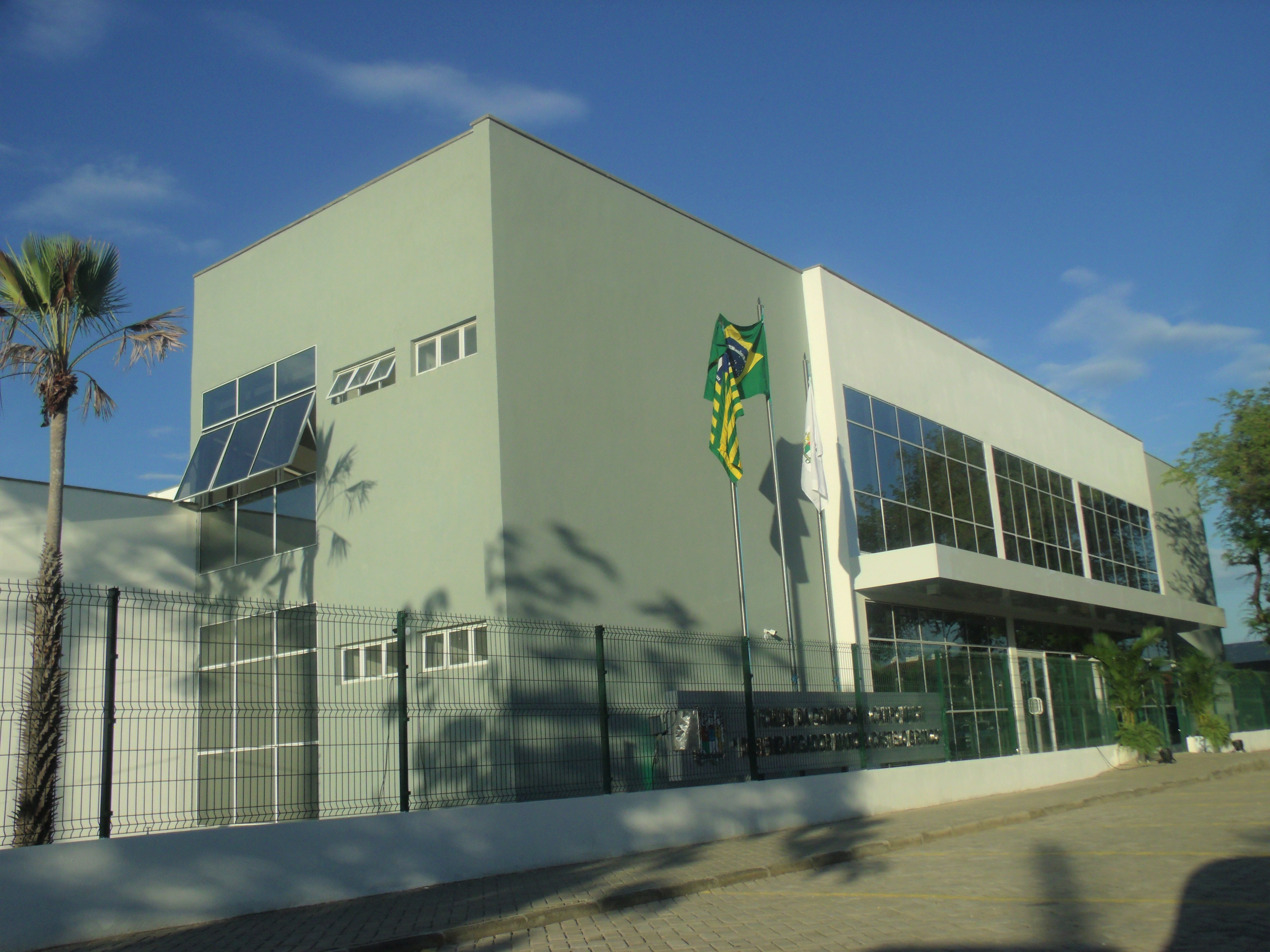 Fórum de Campo Maior pertencente ao Tribunal de Justiça do Estado do Piauí.